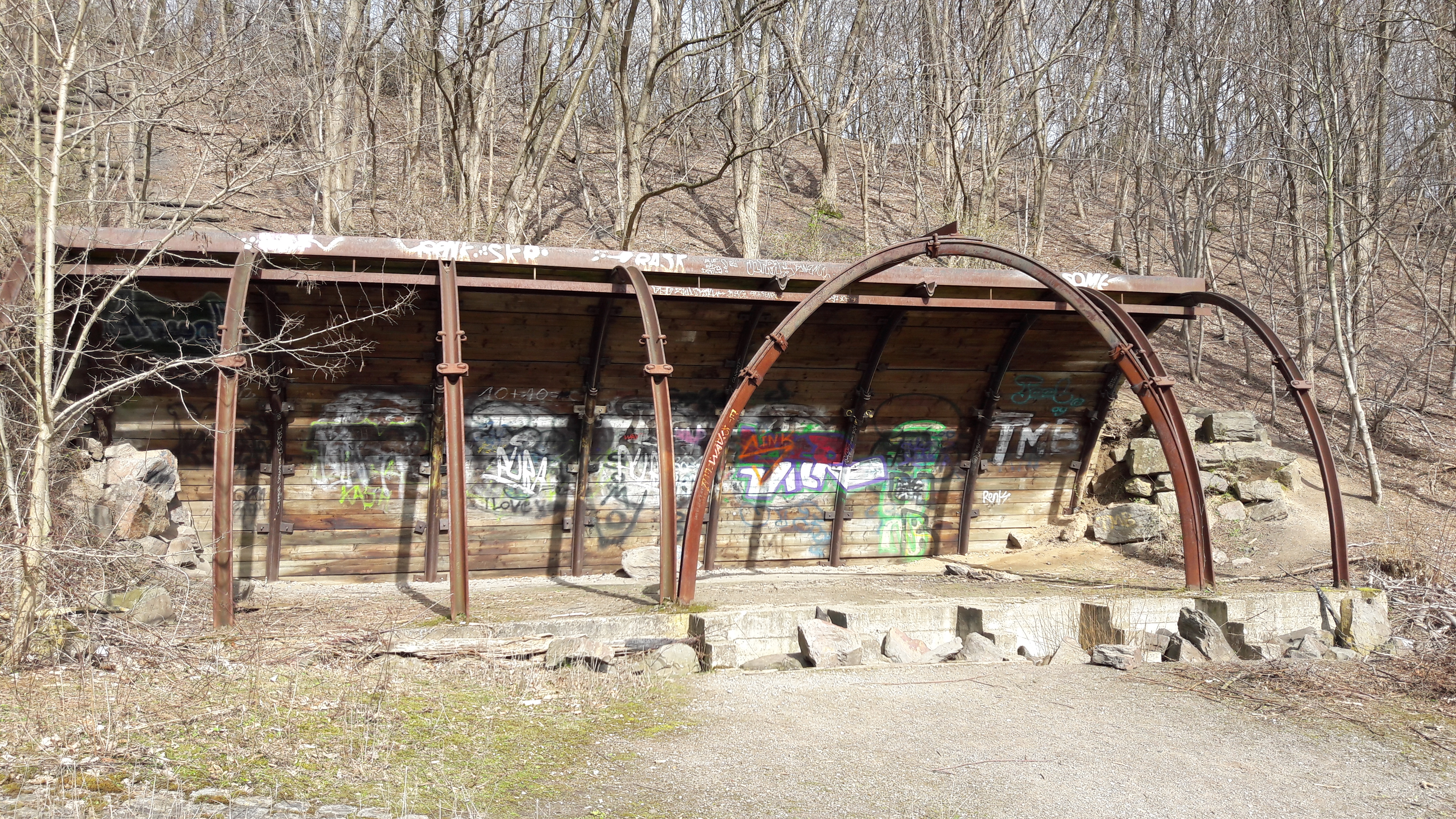 Altes Tunnelstück auf der Halde Pattberg